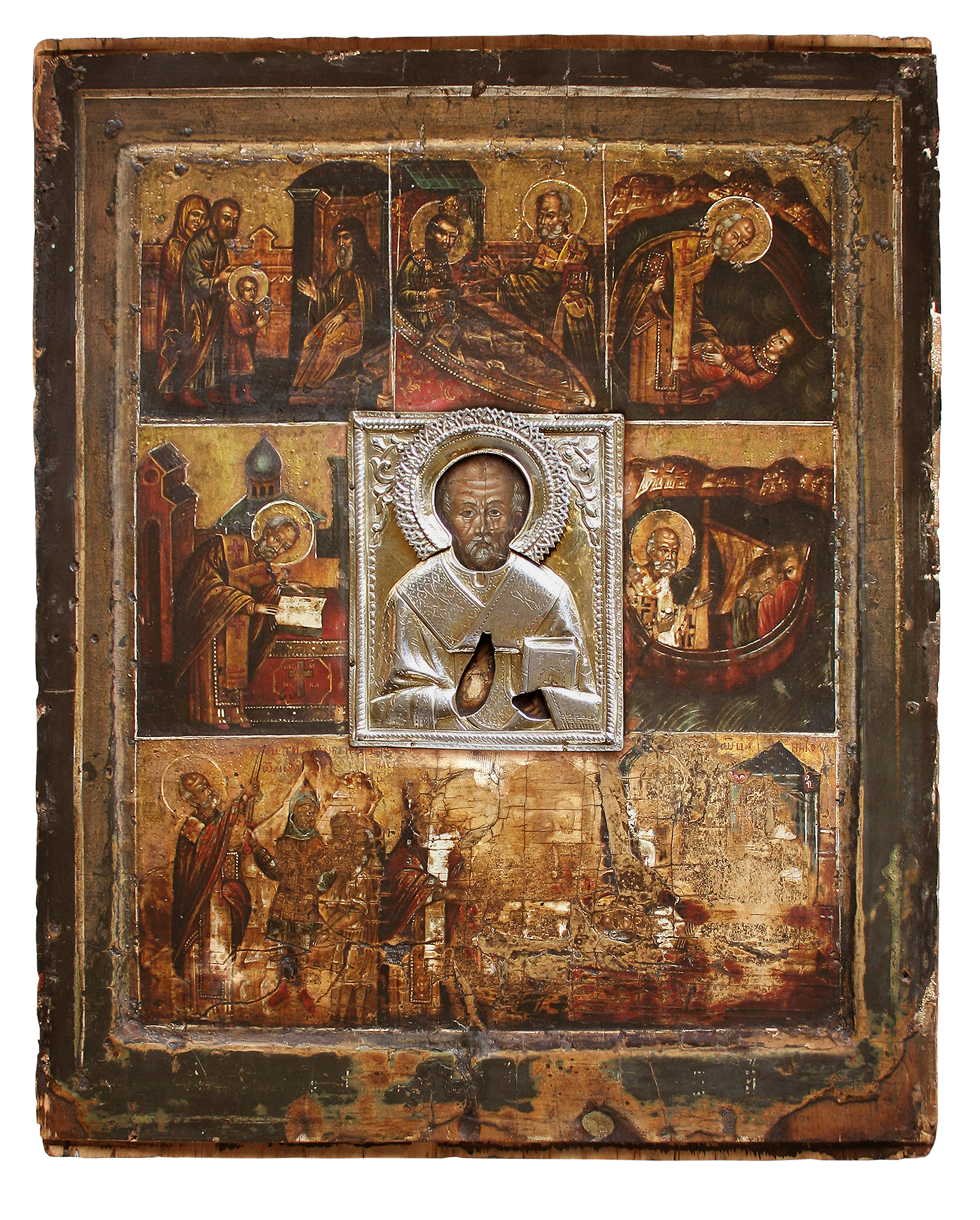 Velikorezkaya ikon of Hl. Nikolaus, Russia Великорецкая икона святителя Николая Чудотворца